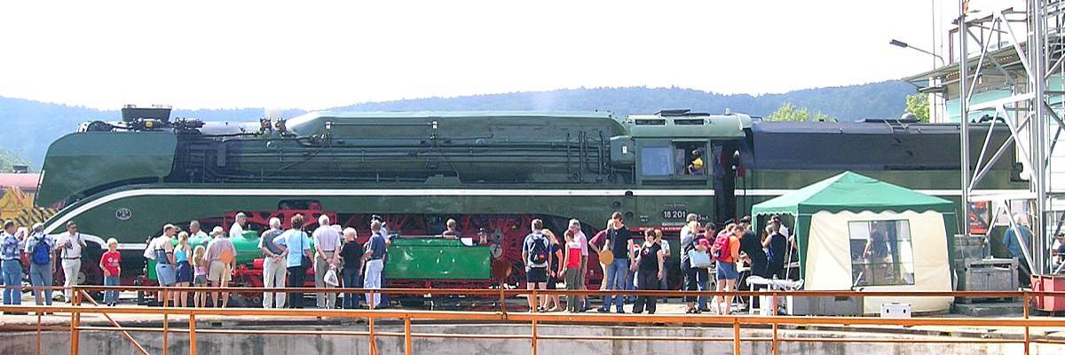 Beeindruckende Länge von 25,15 Meter: die 18201 bei den Meininger Dampfloktagen 3. und 4. September 2005. Davor steht als Kontrast eine Lokomotive der Dresdner Parkeisenbahn. Fotograf+Autor: kramer96